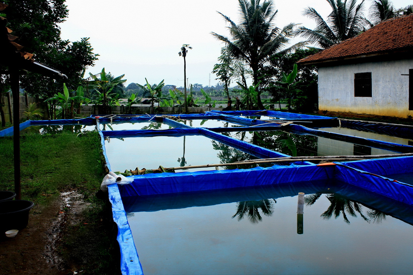 Kolam terpal untuk pendederan gurami